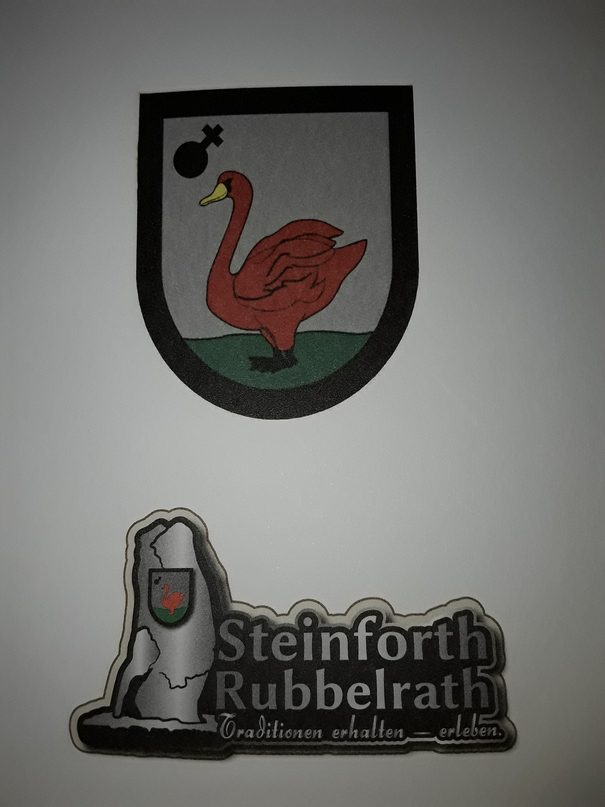 Dorfwappen seit 2000 und Leitspruch der Doppeldörfer